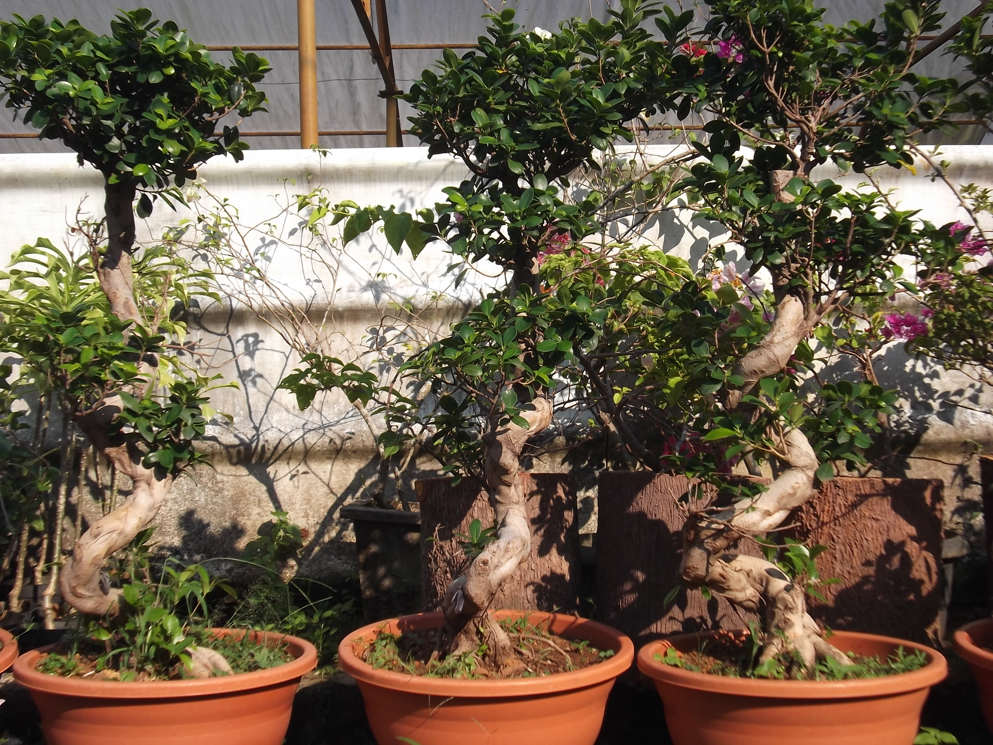 ബോൺസായ്